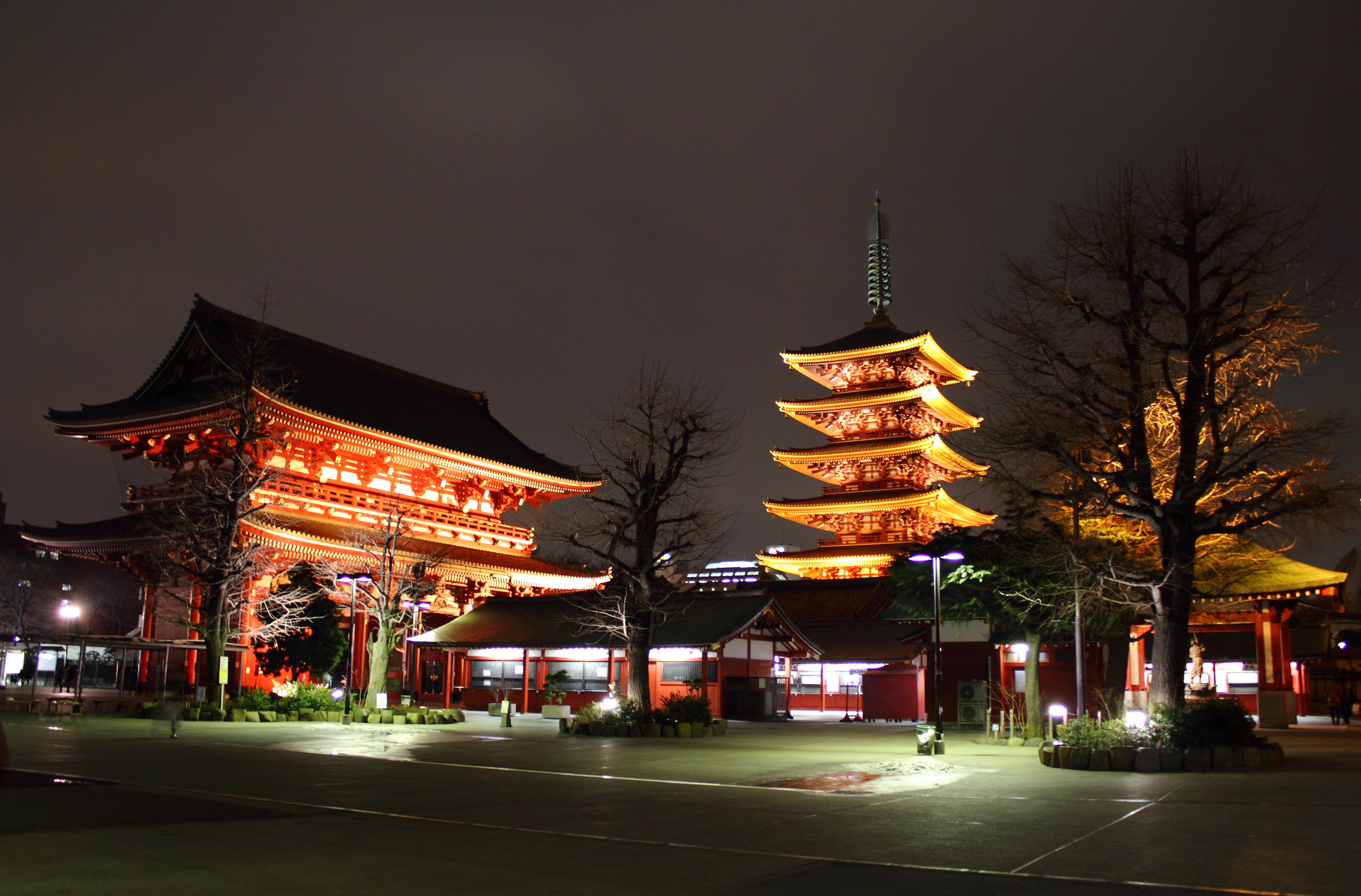 浅草寺のライトアップ（宝蔵門及び五重塔）